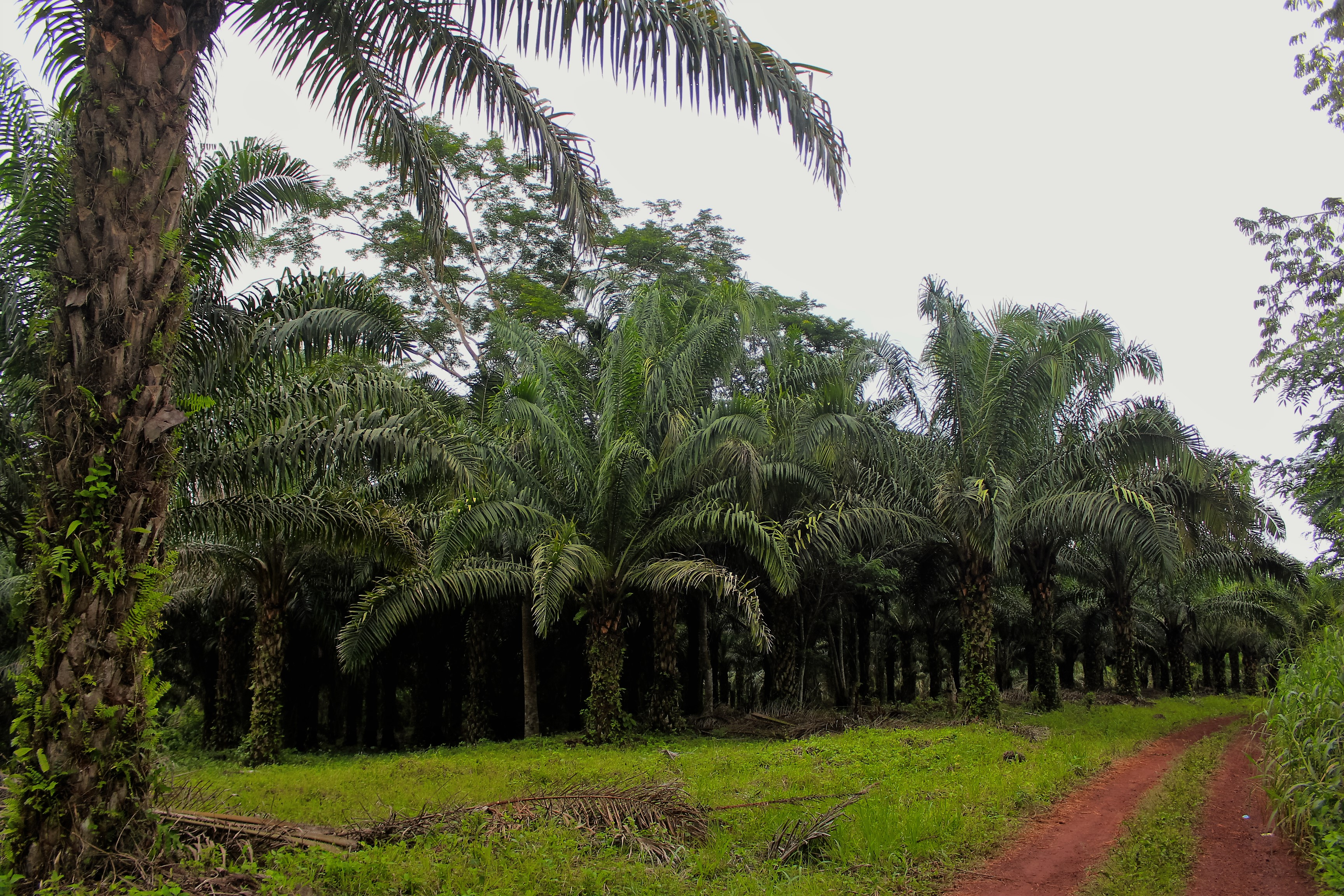 Village Ndanga dans le groupement de Simbane est un imposant village de par son industrie agricole. (OMÉGA FARM).vous trouverez hors mit les palmeraie aussi fruits,et bien d'autres.